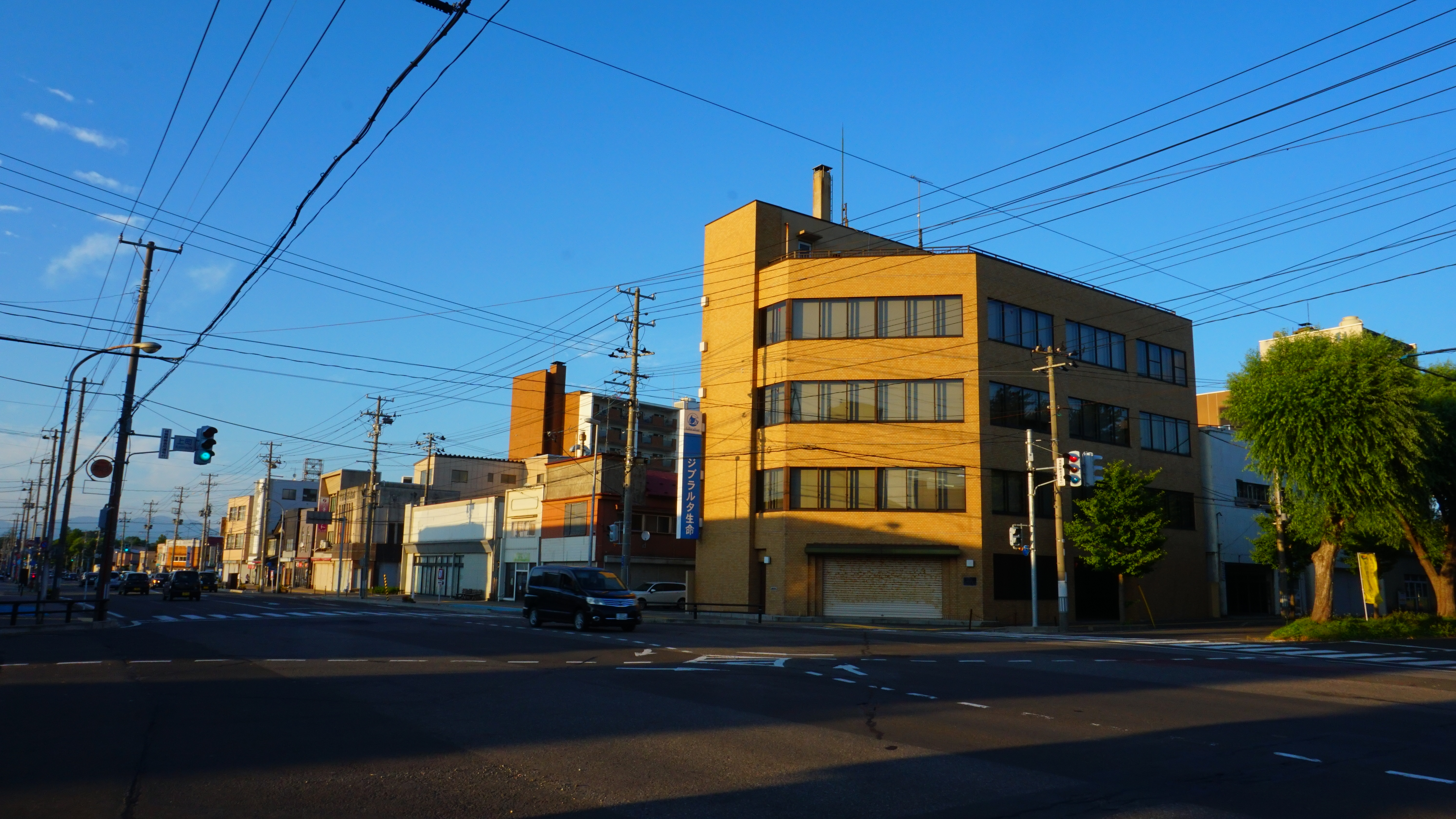 能代市 上町交差点